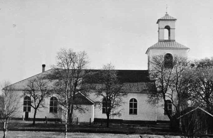 Malmbäcks kyrka